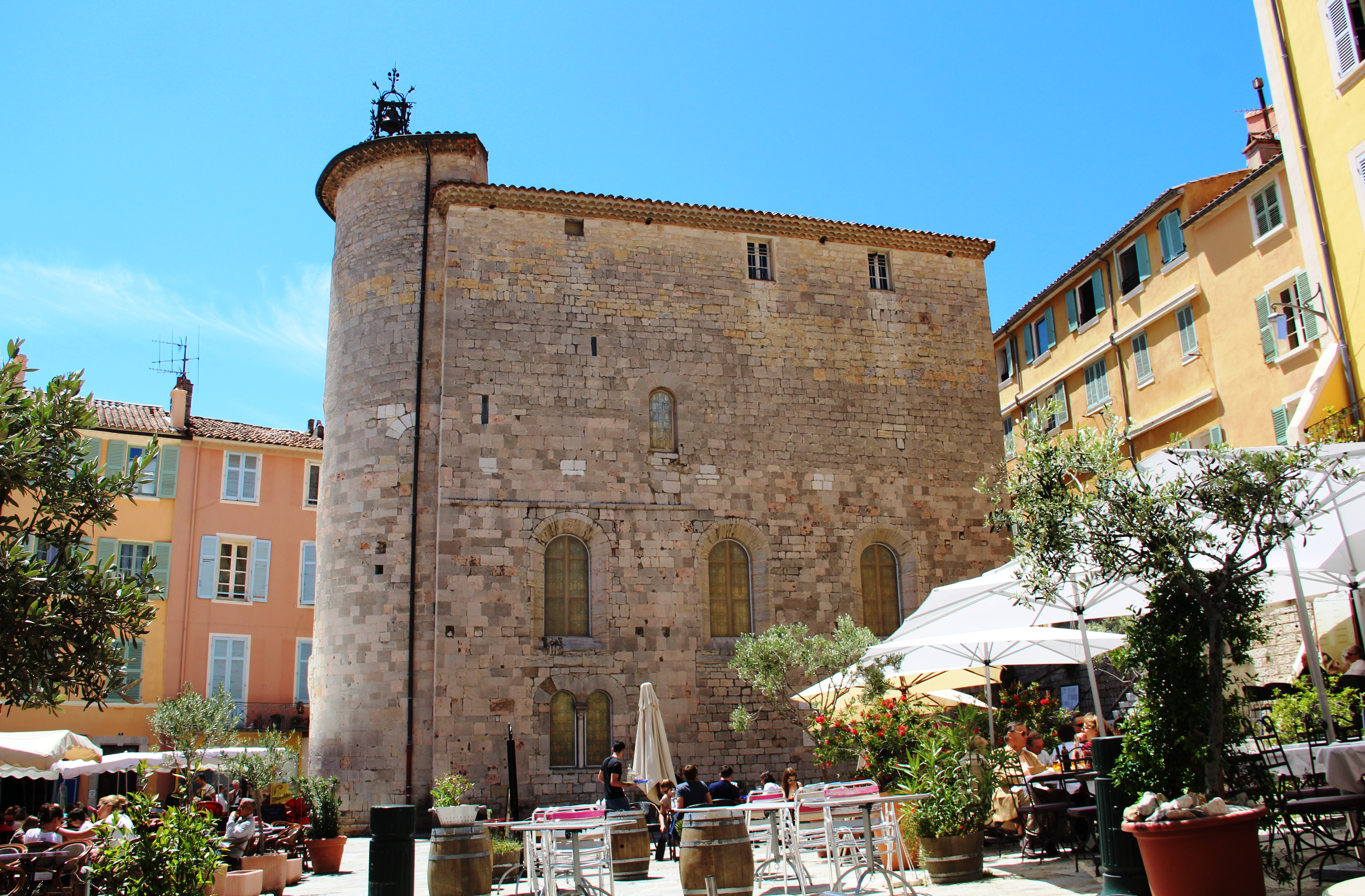 La Tour des Templiers - Hyeres